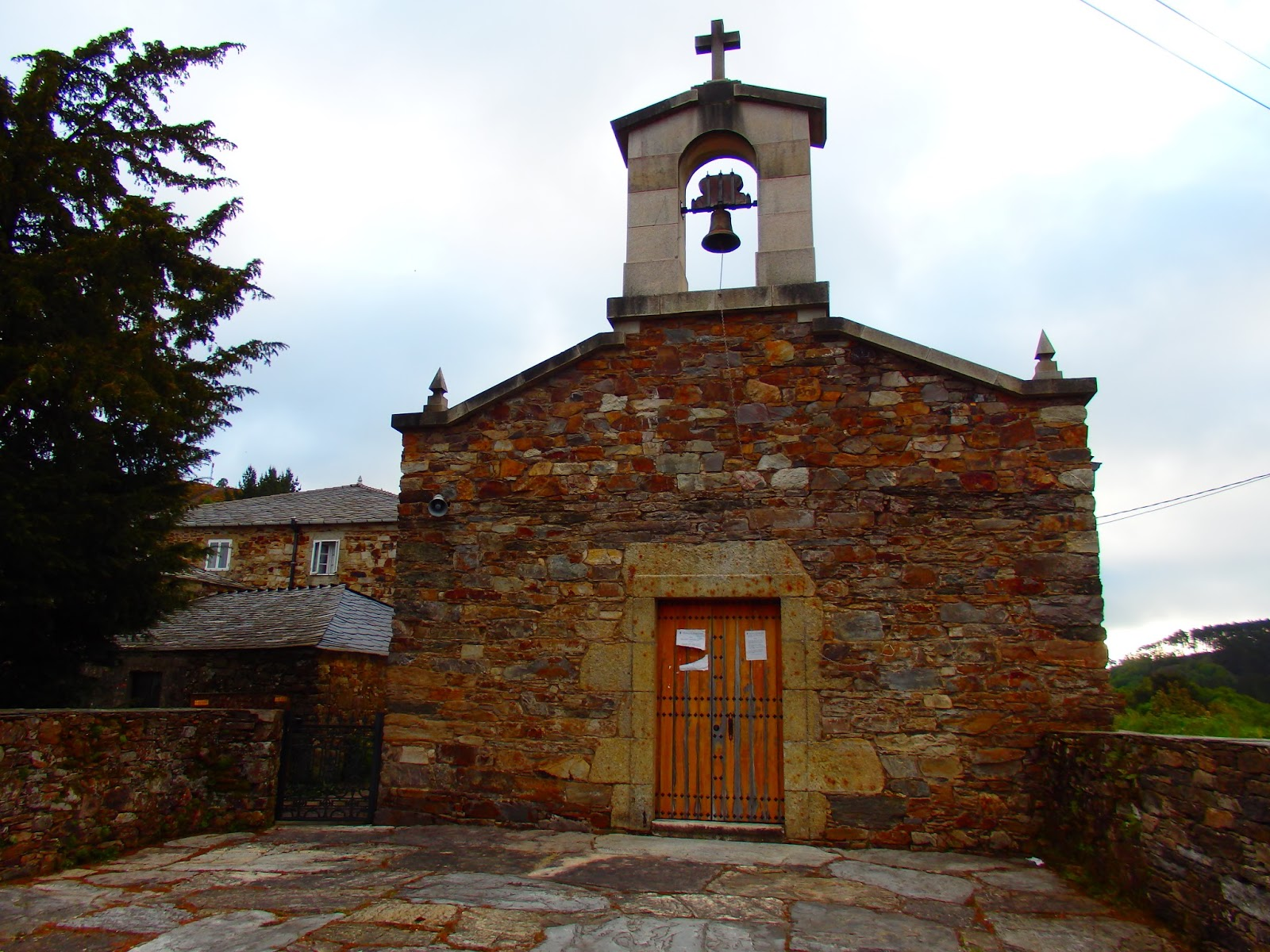 Igrexa de San Xoán da Lastra, Baleira.